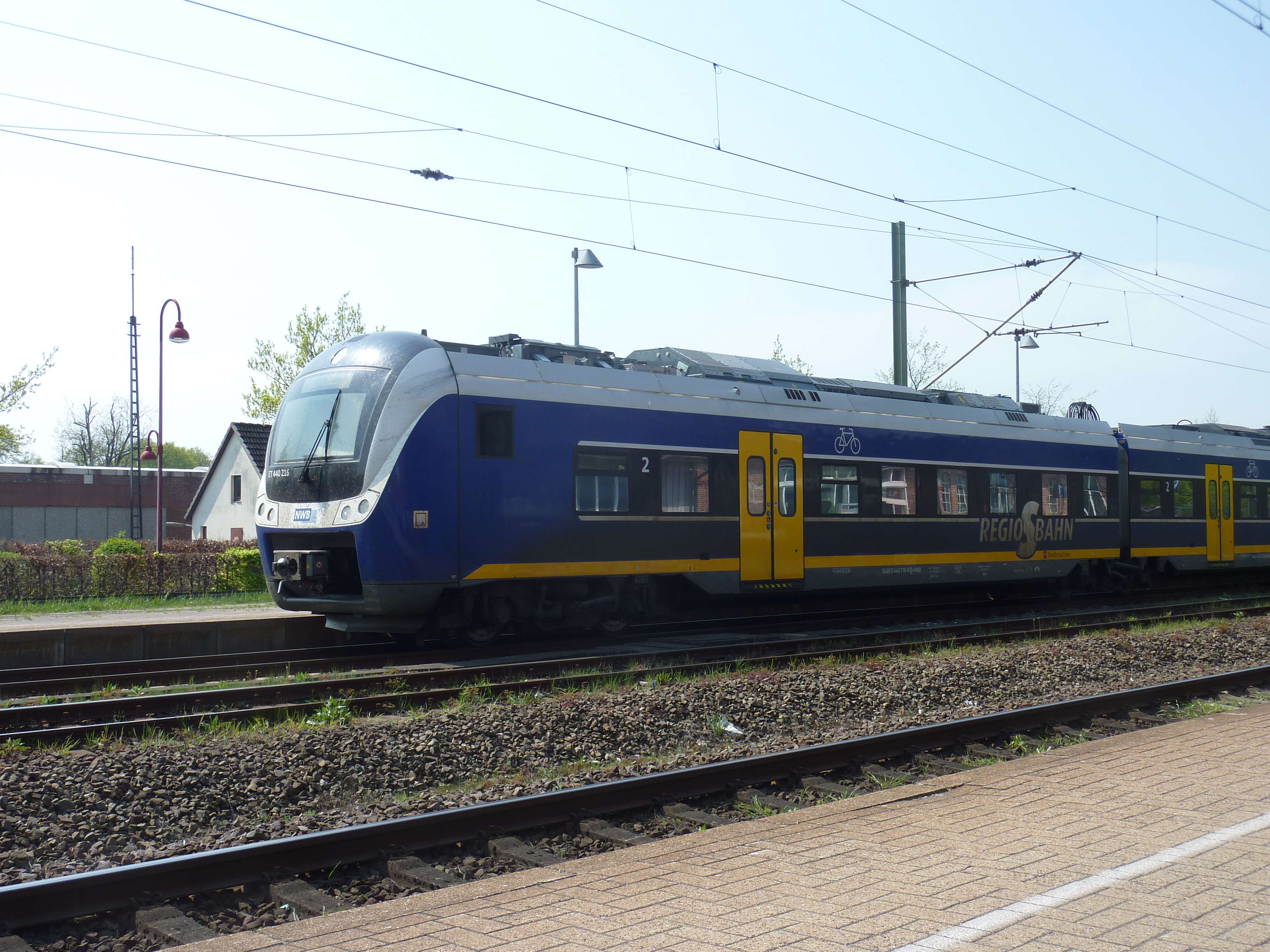 Zug im Bahnhof Bad Zwischenahn